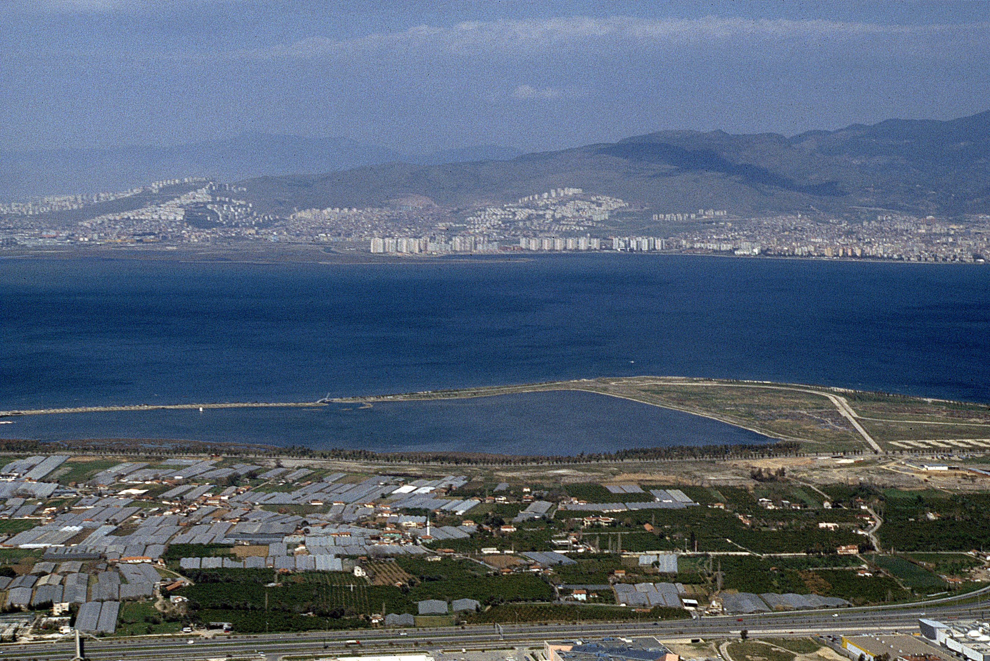 oberhalb Balçova: Blick auf die Bucht von İzmir